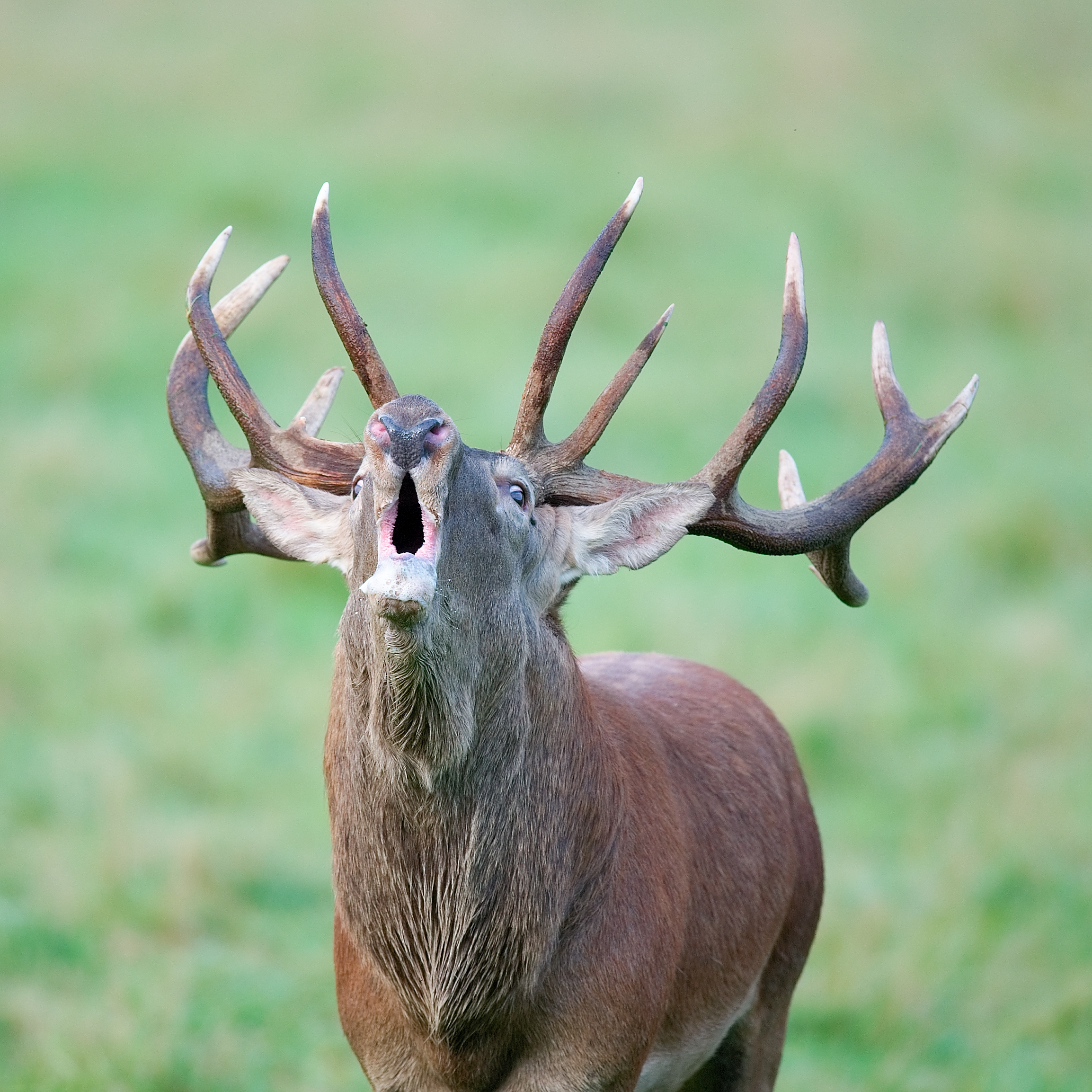 Cervus elaphus